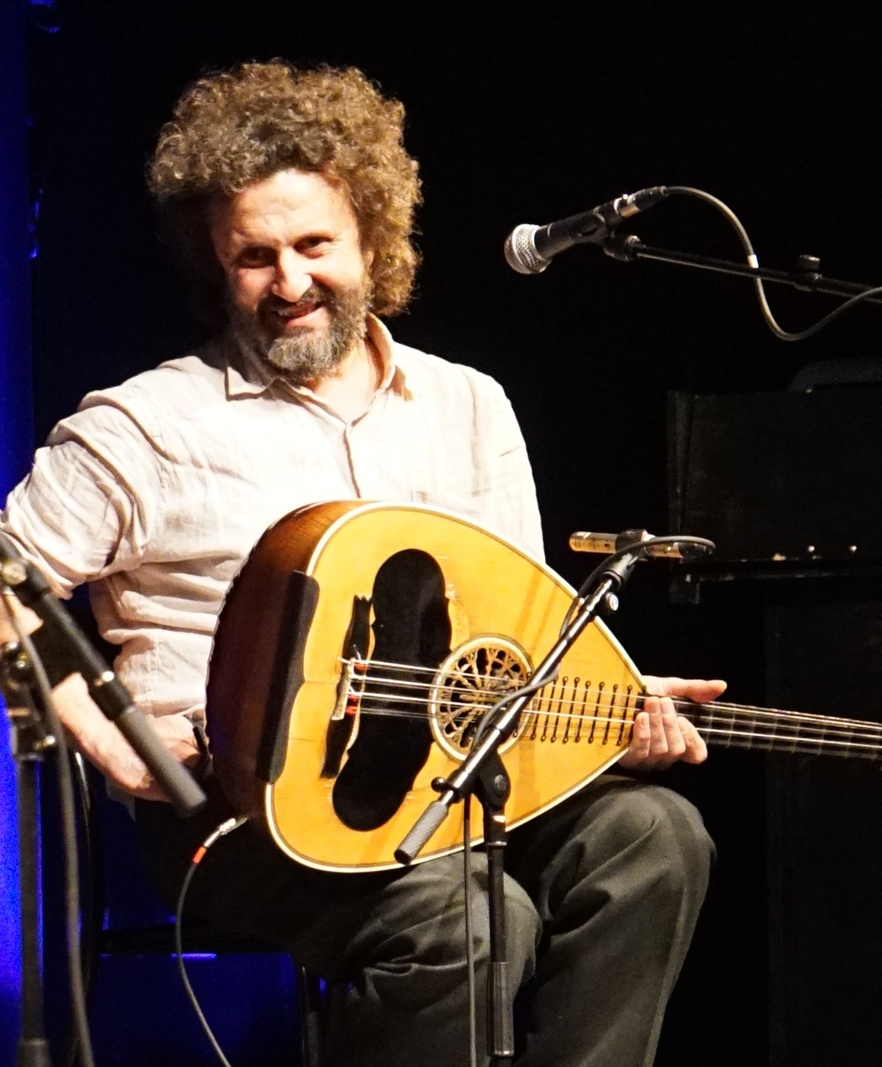 en concert à la Cartonnerie de Reims.